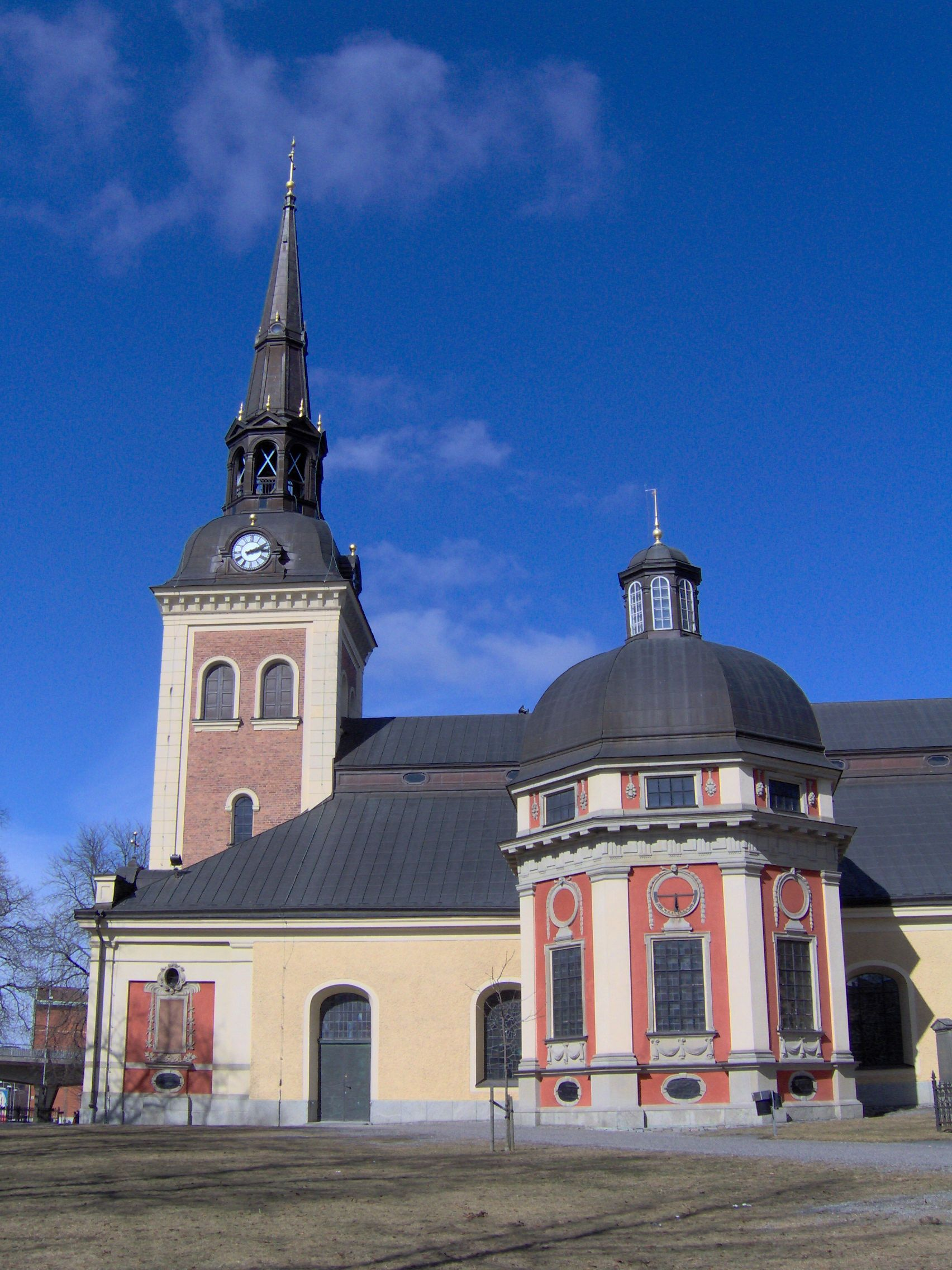 Sankta Ragnhilds kyrka, huvudkyrka för Södertälje. April 2006. Sankta Ragnhilds church, main church of Södertälje, 4 metric miles south of Stockholm, the capital of Sweden. Picture taken in April, 2006.